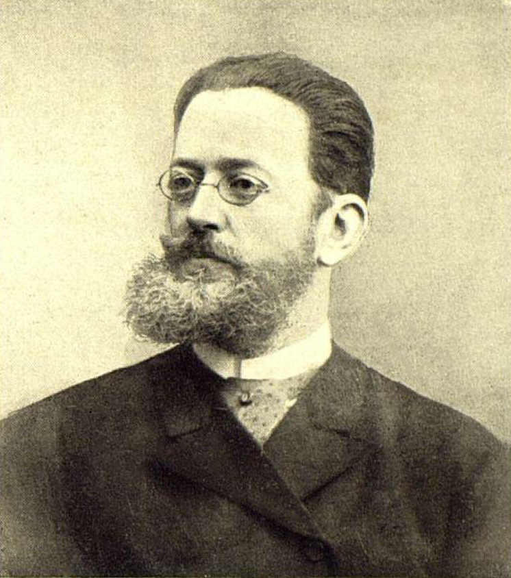 Юнкер В.Ф., председатель правления (1884—1885) Санкт-Петербургского частного коммерческого банка